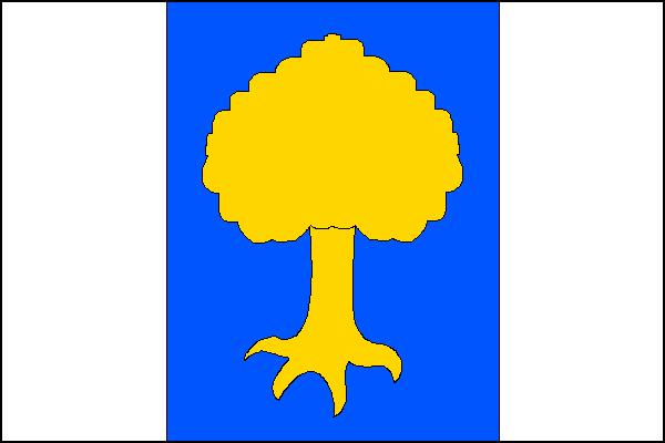 Vlajka obce Černovice